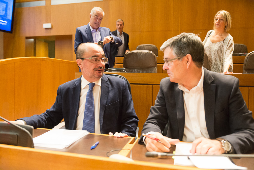 Debate de Aragón_segundo día_marca de agua_foto-Pablo Ibáñez-2